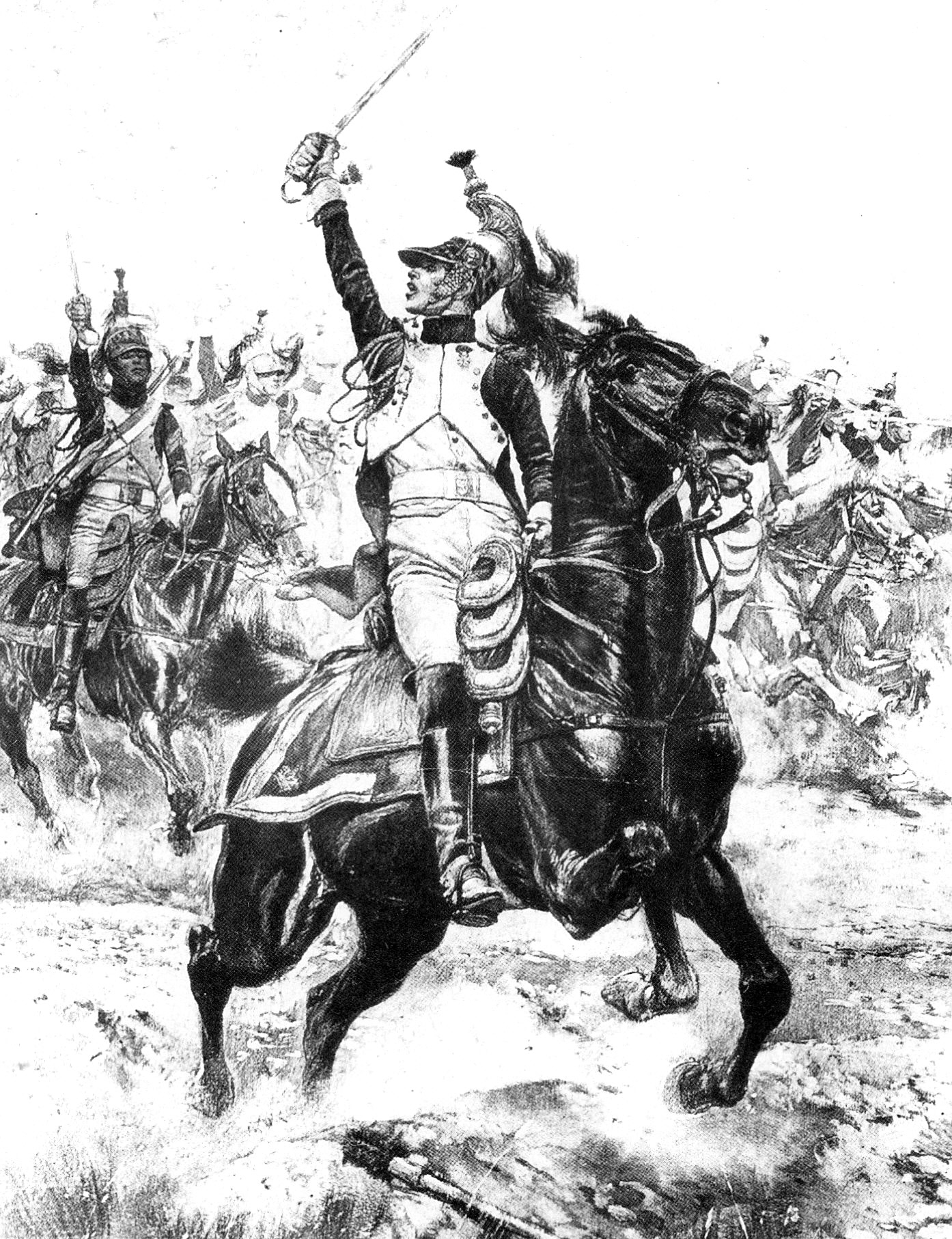 Charge des dragons de la Garde impériale à la bataille de Saint-Dizier, 26 mars 1814. Commandés par le général Letort, les dragons dispersent les Russes et s'emparent de 18 pièces d'artillerie.